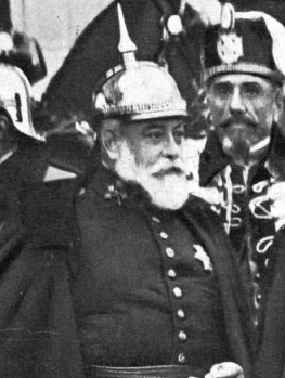 El General Marina en Palacio. El general Marina hablando con el periodista Sr. Mencheta y los coroneles Zabalza y Lafuente al salir del banquete celebrado en Palacio el sábado último (Fot. Goñi.)